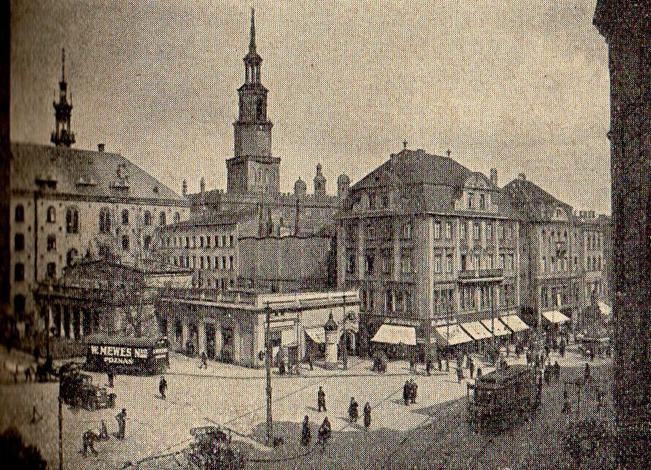 Stary Rynek w Poznaniu w okolicach PeWuKi, 1929r.